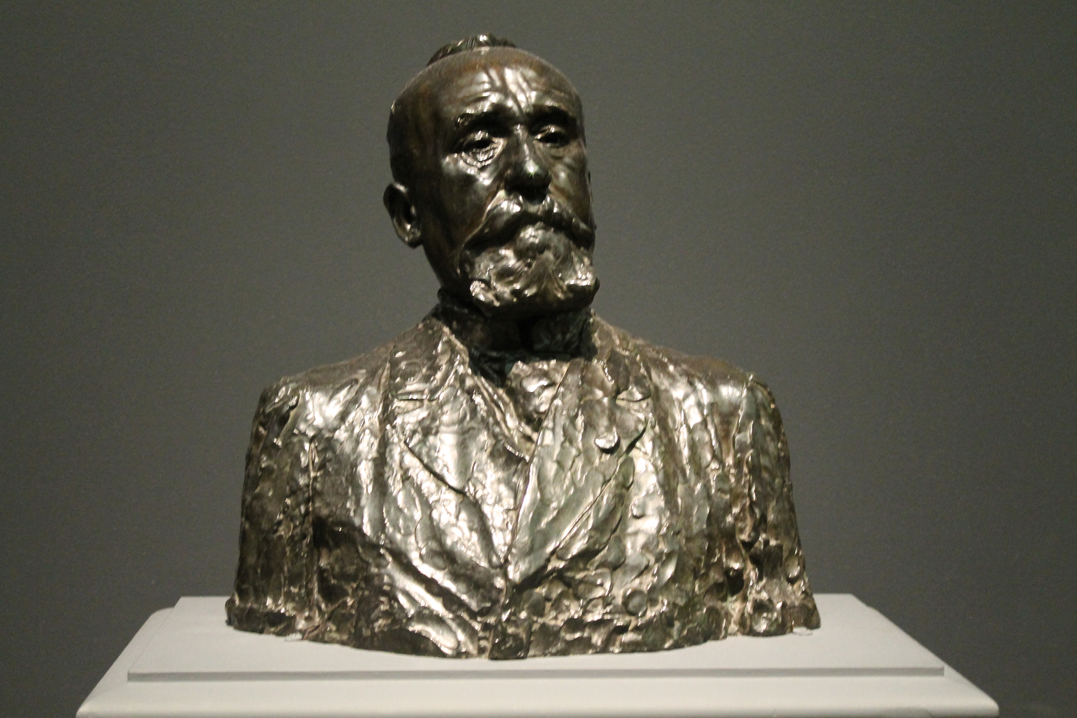 Bronce de Pierre Puvis de Chavannes, de Auguste Rodin. Modelado c. 1890. Vaciado c. 1910. Museo Metropolitano de Arte. Nueva York (Estados Unidos).